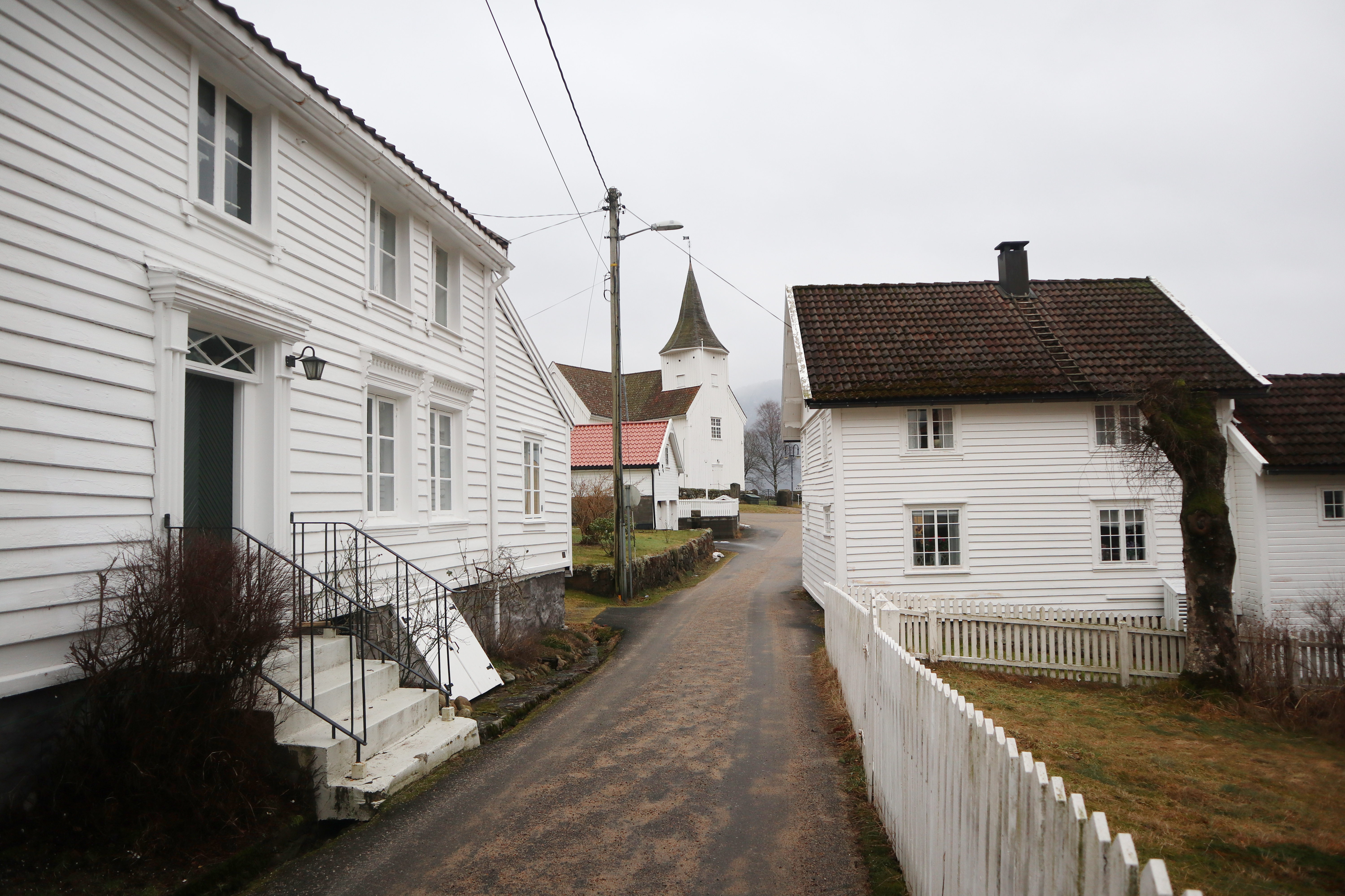 Feda kirke med Vestlandske hovedvei og bebyggelse i forgrunnen